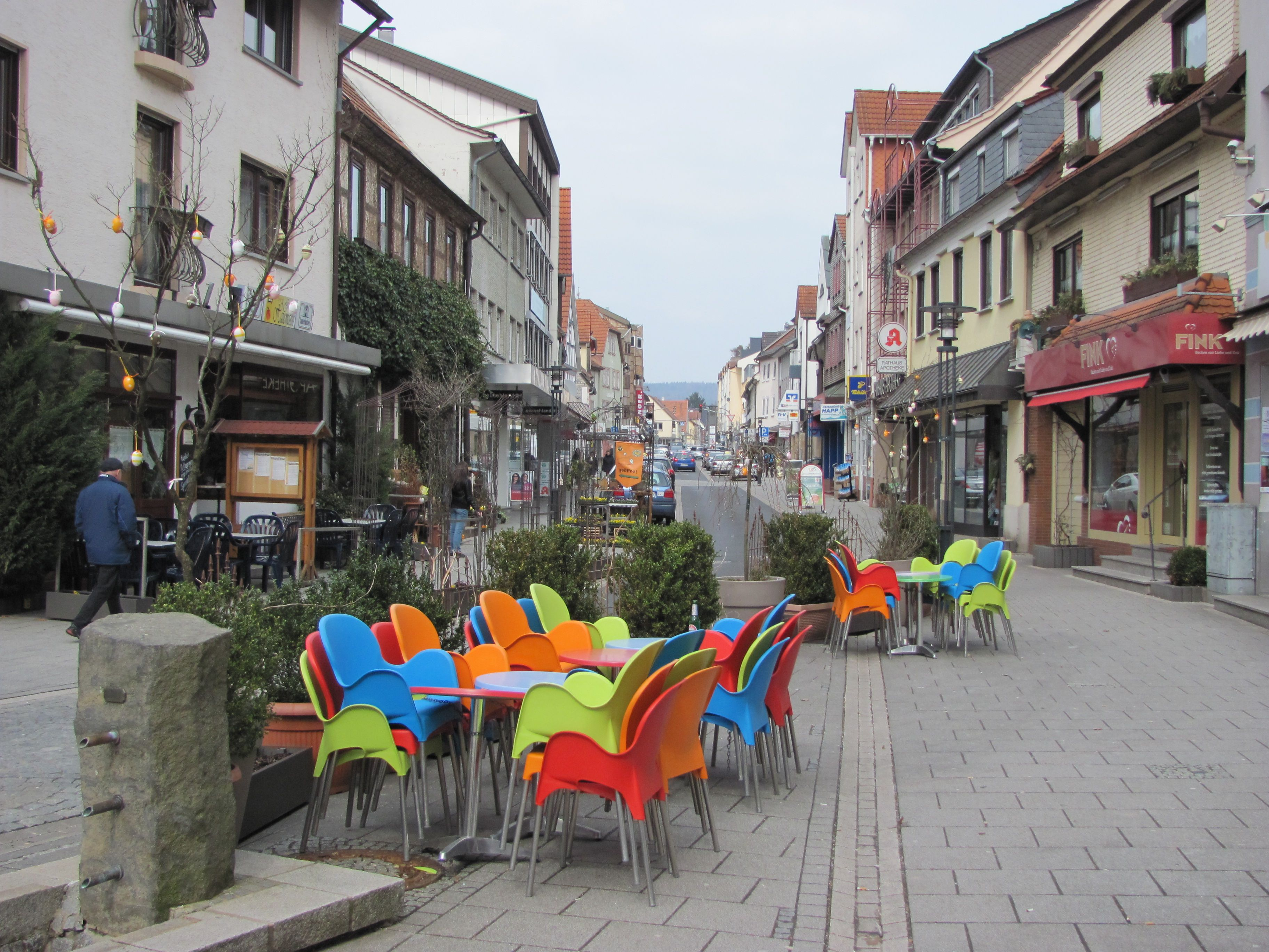 Germany